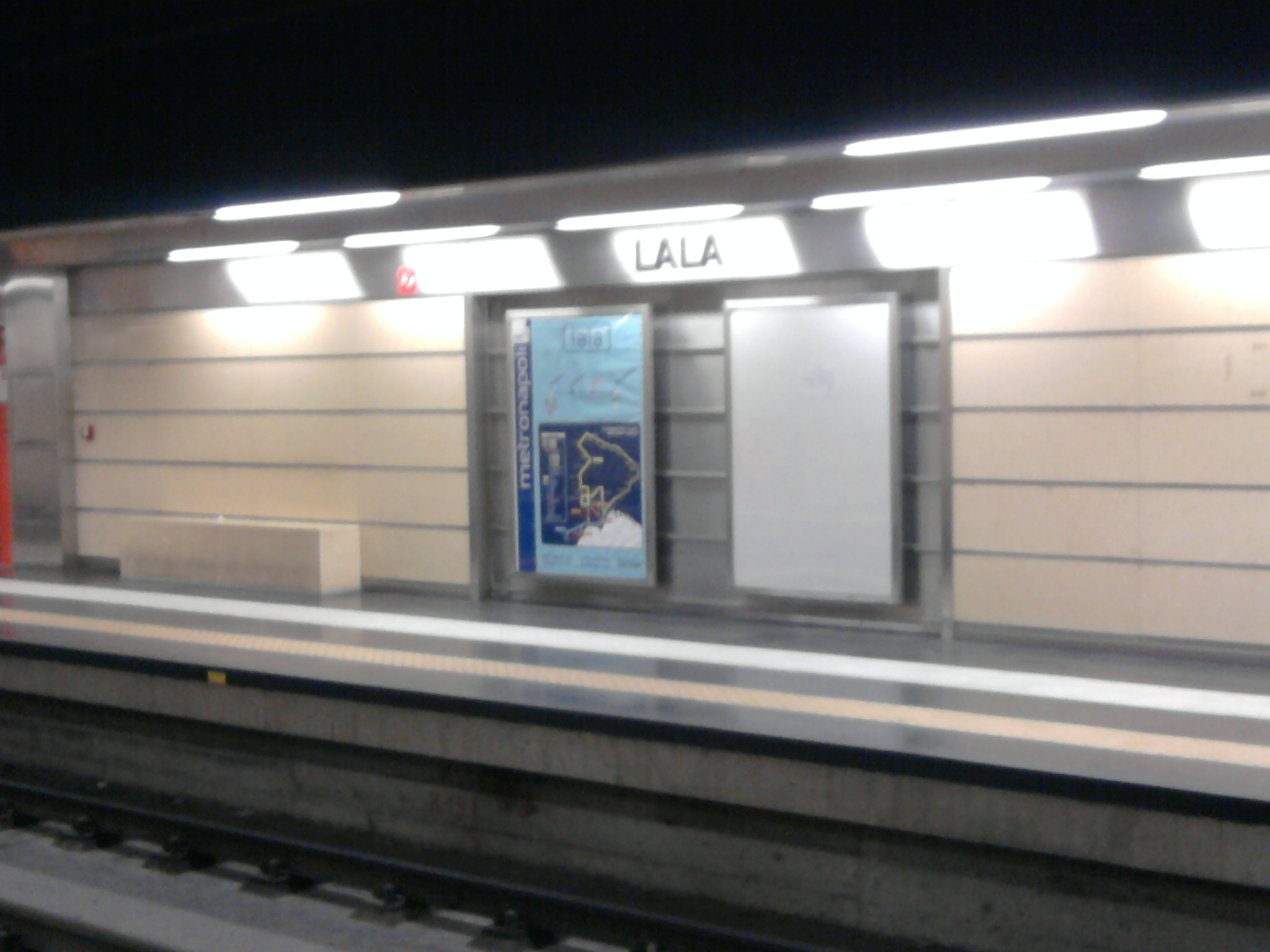 La stazione di Lala